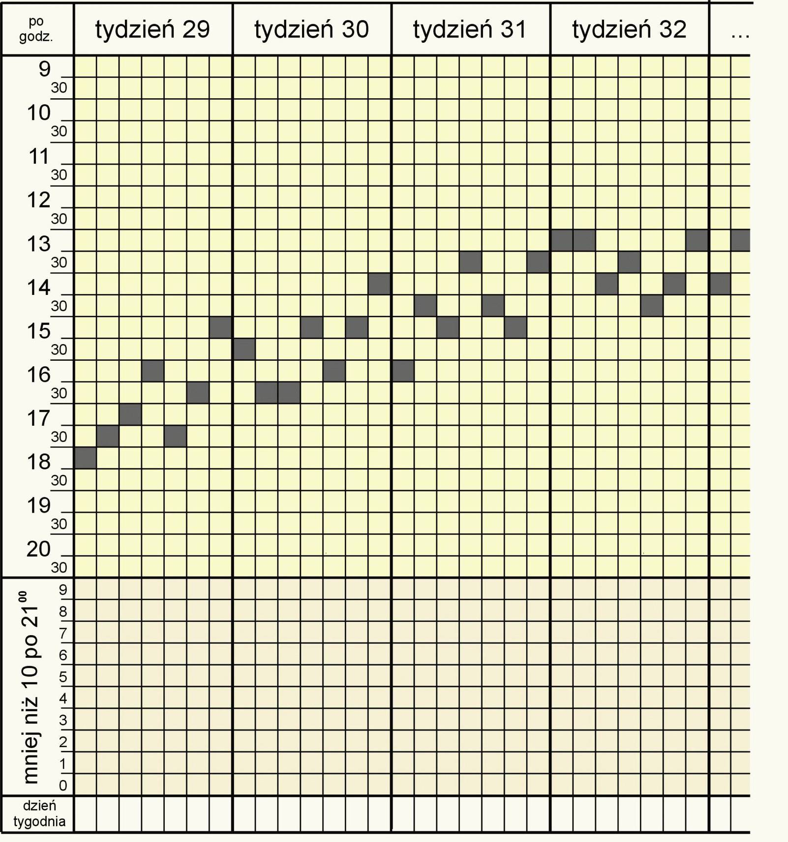 Wykres stosowany w metodzie Cardiff.